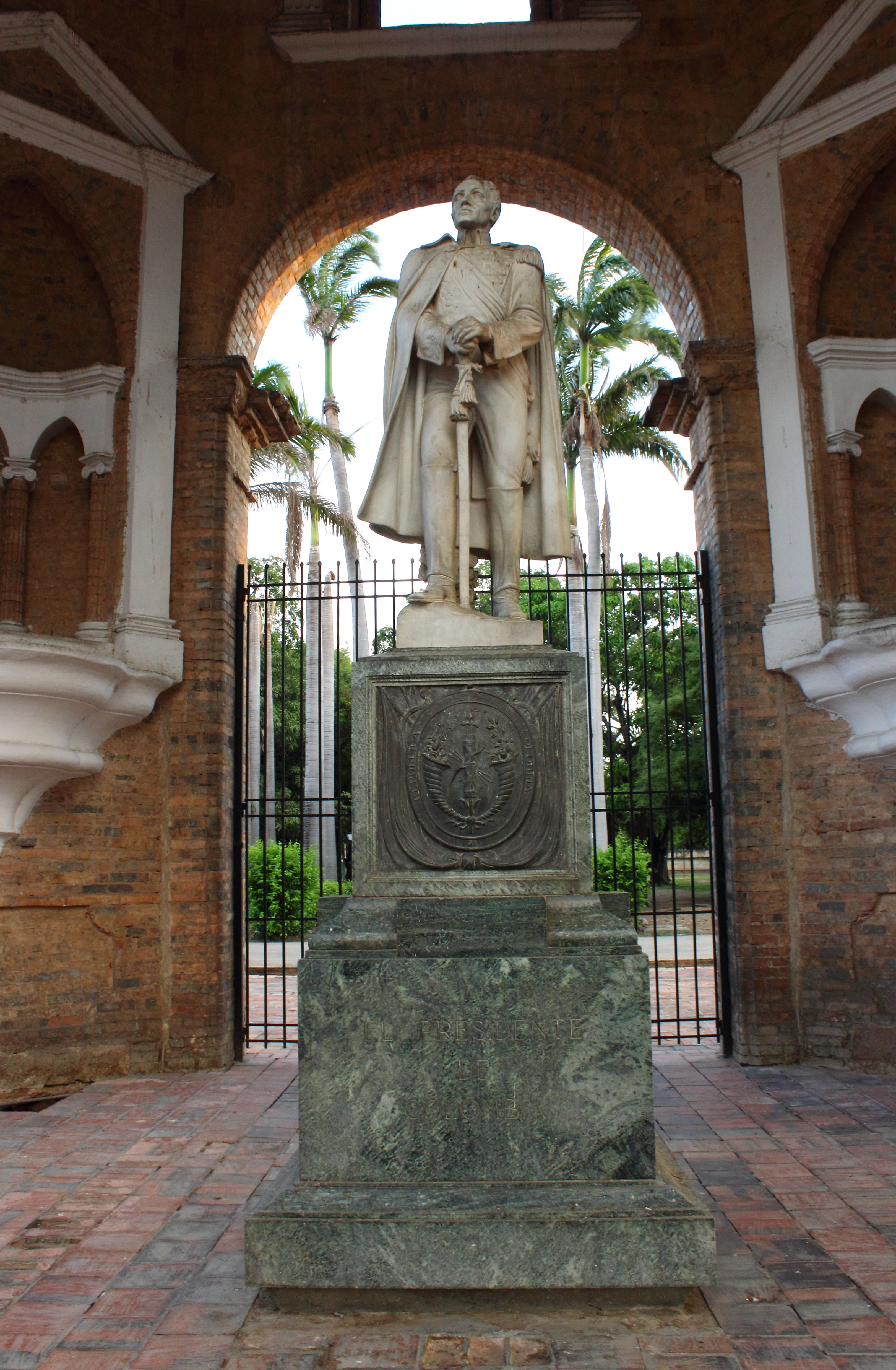 Plaza parque Gran Colombiano, aqui se encuentra el Templo histórico, La Casa Museo Del General Santander y la estatua del General Santander